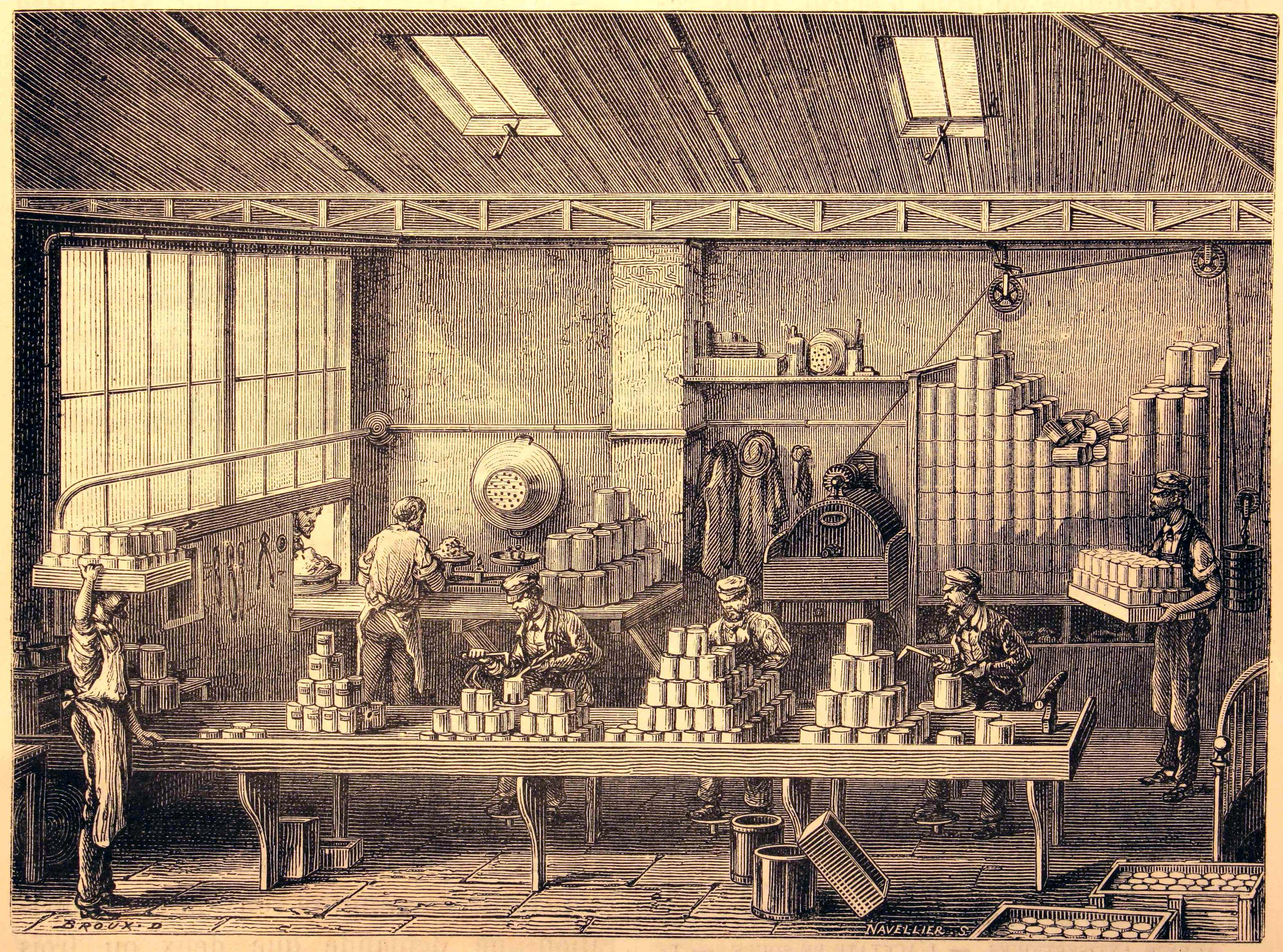 Ilustraciones de la obra : Les merveilles de l'industrie ou, Description des principales industries modernes / par Louis Figuier. - Paris : Furne, Jouvet, [1873-1877]